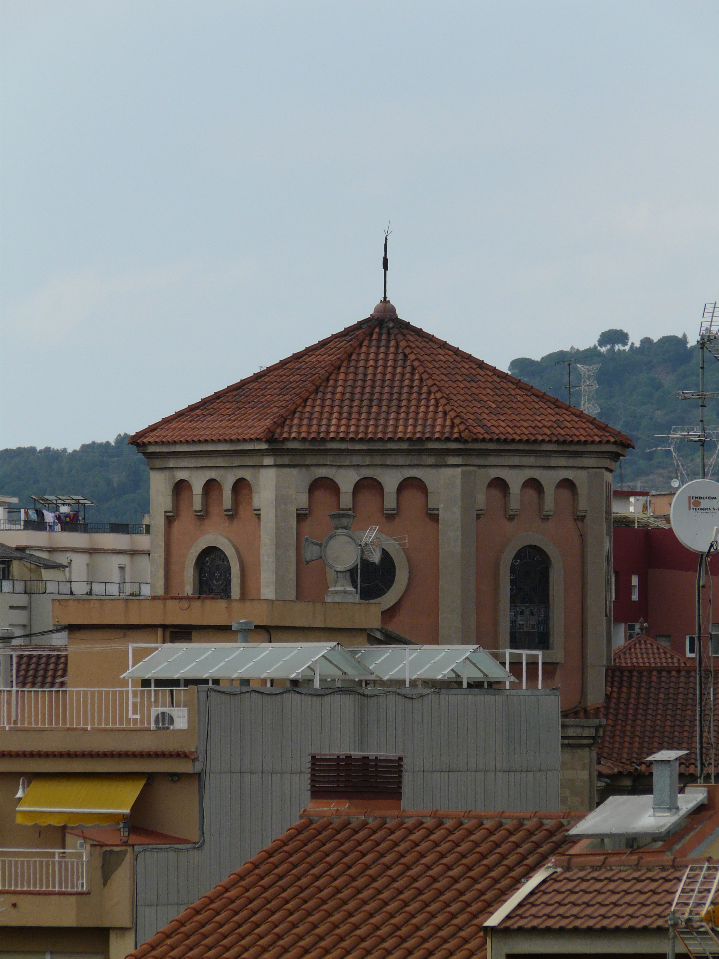 Parròquia de Sant Llorenç, ara catedral de Sant Feliu de Llobregat Object location41° 22′ 50.87″ N, 2° 02′ 45.7″ E